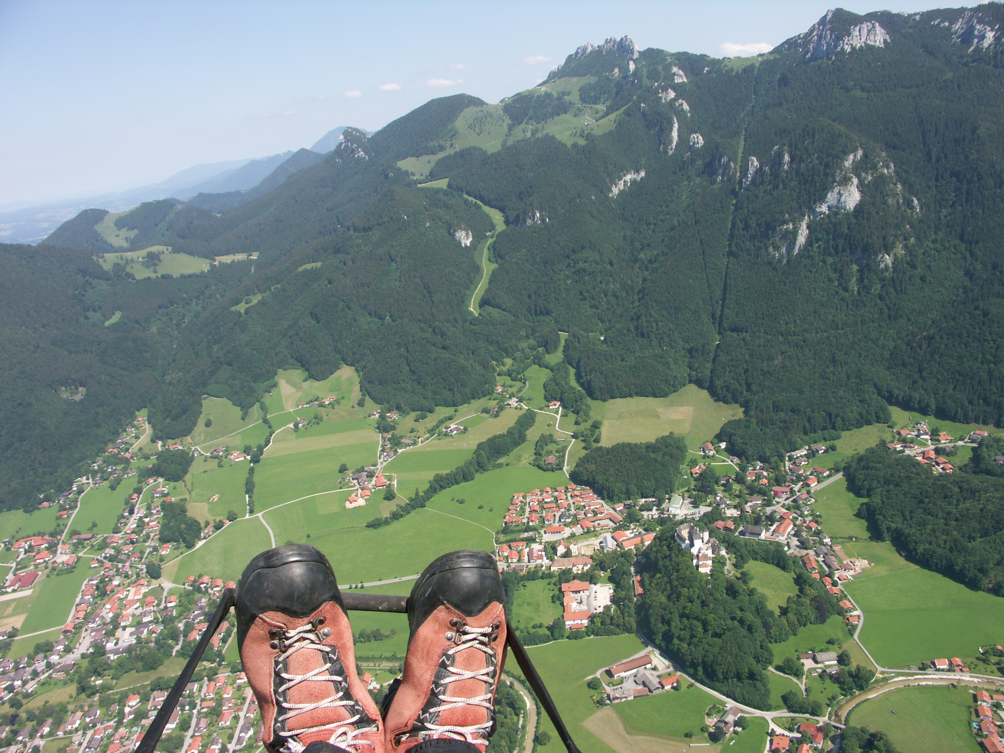 Aschau im Chiemgau, Germany as seen from Paraglider